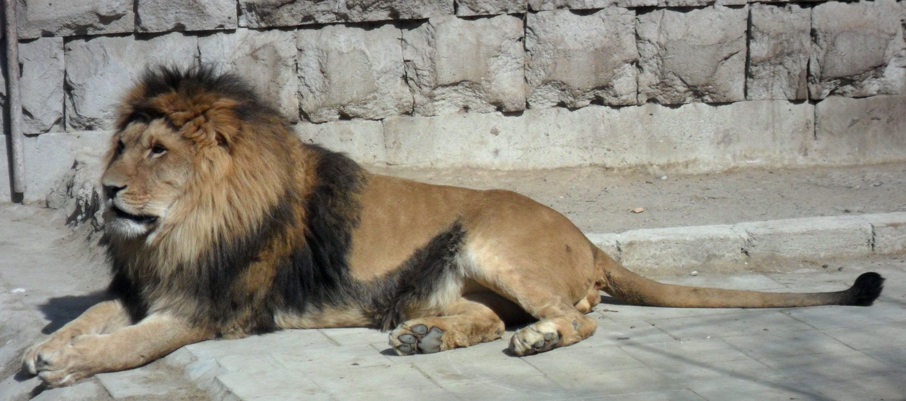 Bakı Zooloji Parkı